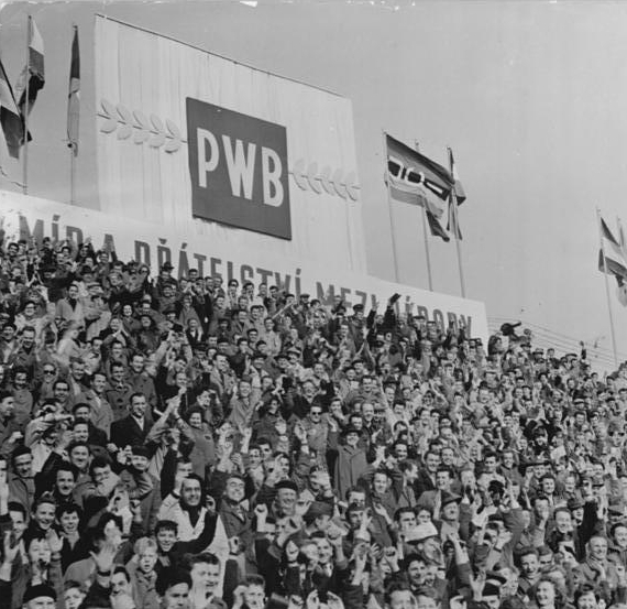 Friedensfahrt, Brno, Zuschauer Zentralbild Wendorf 4.5.1960 - XIII. Friedensfahrt 1960 - 1. Etappe. UBz: Begeisterte Zuschauer im Stadion von Brno feiern den Sieger der 1. Etappe, Schur (DDR).